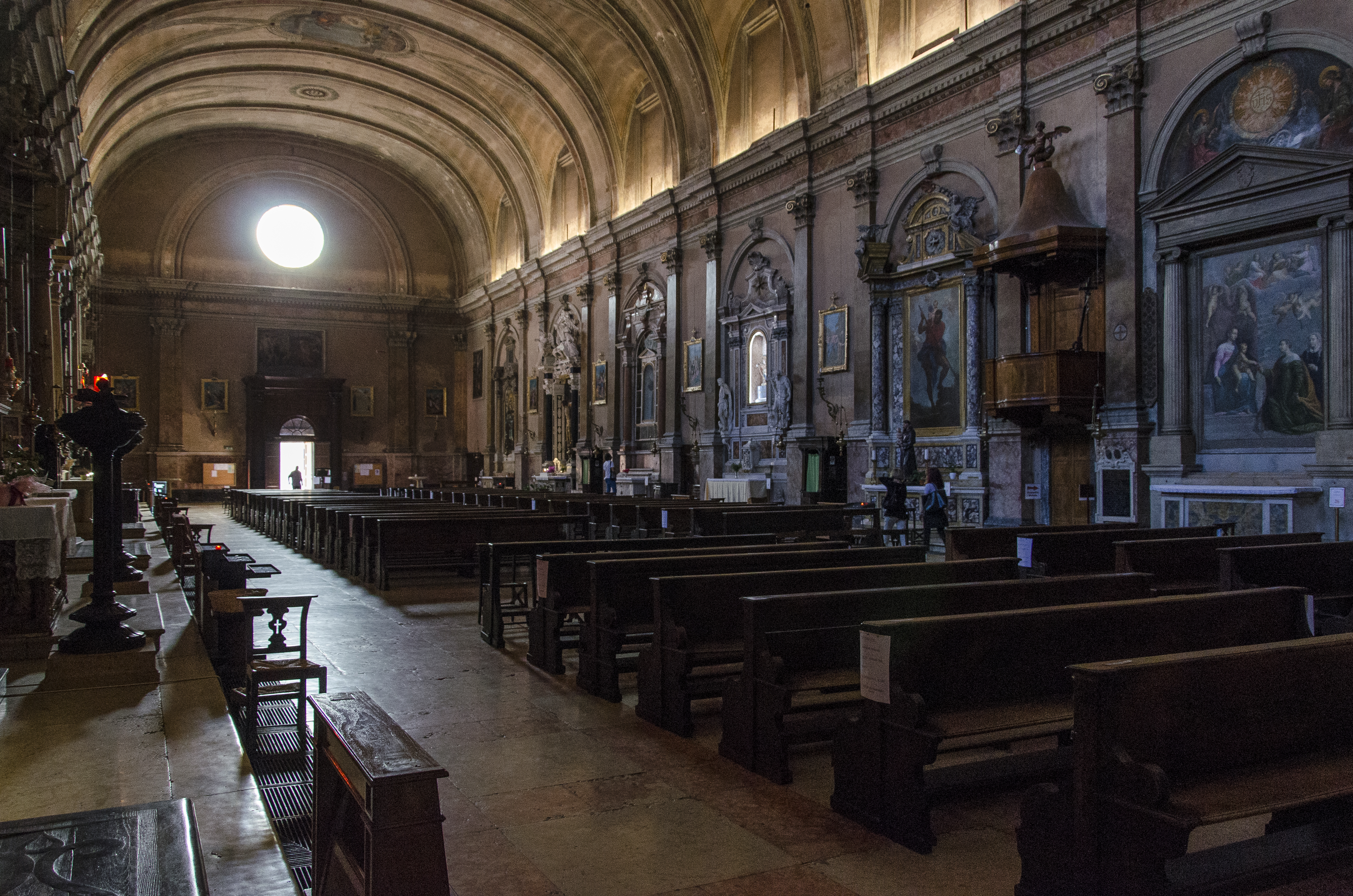 Interno della chiesa di Sant'Eufemia a Verona